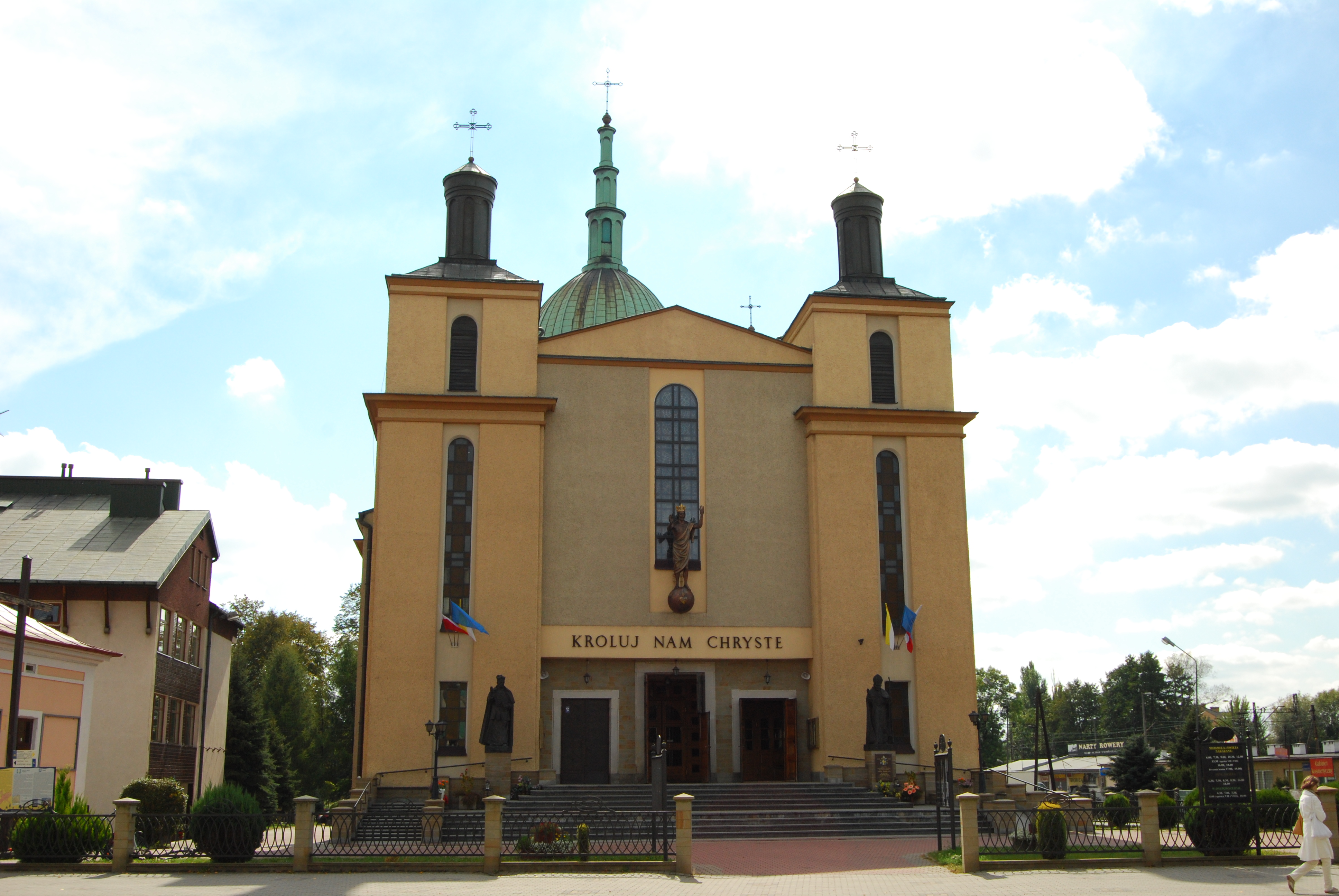 Rzeszów, kościół par. p.w. Chrystusa Króla, 1931-1935